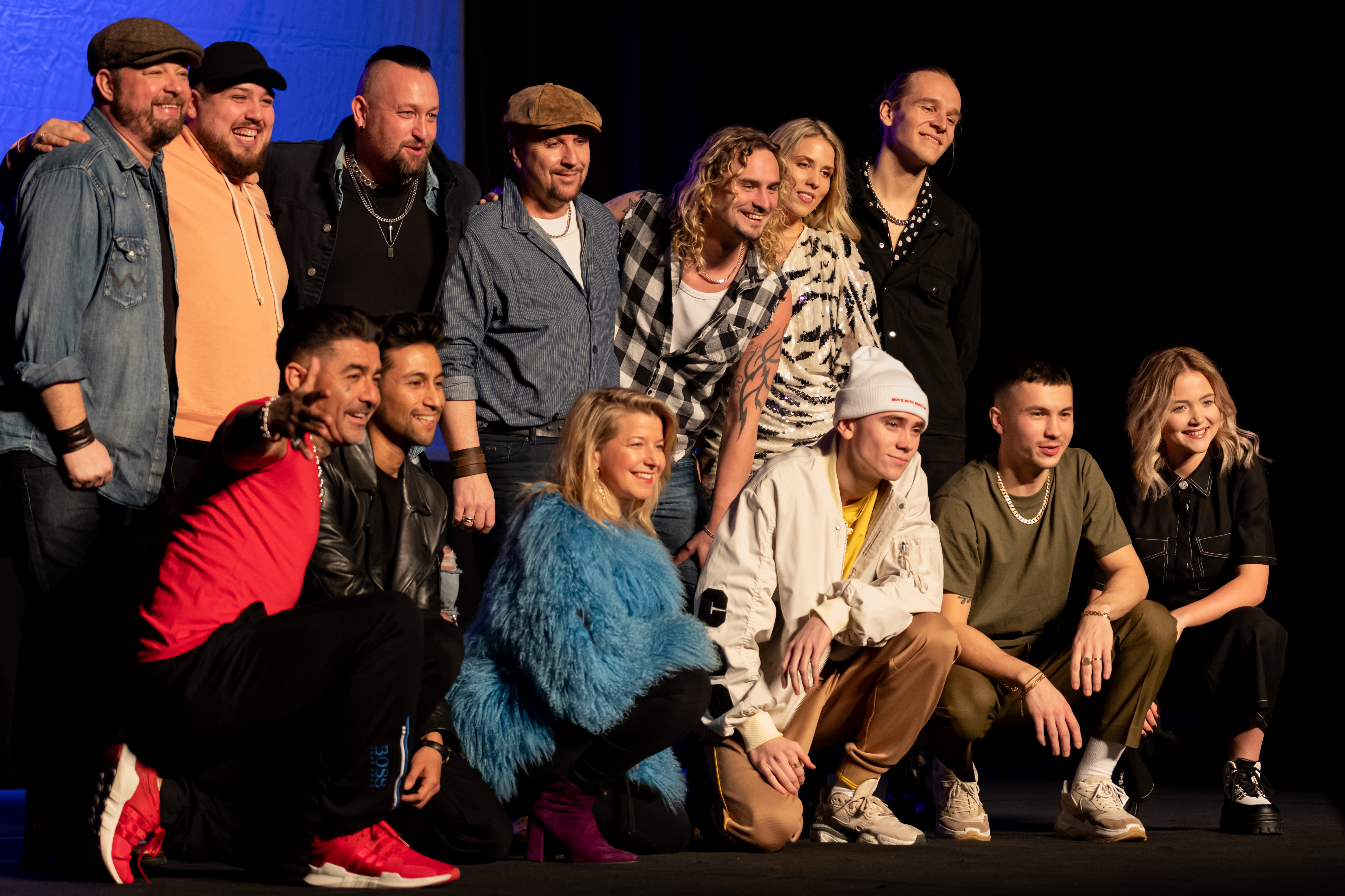 Alla tävlande på pressträff inför andra chansen. Melodifestivalen 2020, Eskilstuna.